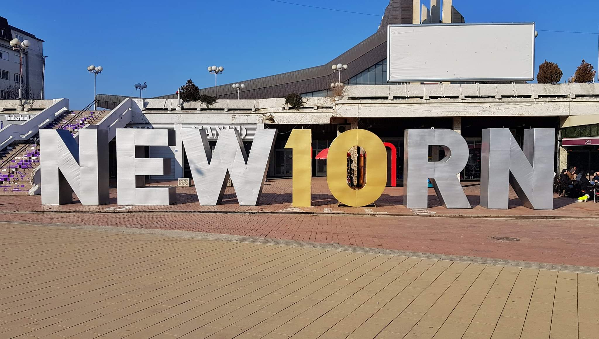 Das Newborn Monument 2018 in Prishtina, Kosovo